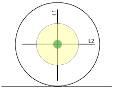 Billard - Point de contact pour effets - Travail personnel, libre de droit